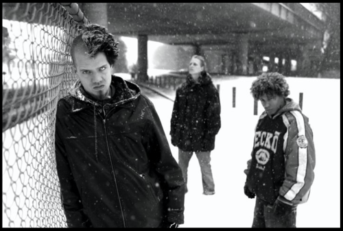 Acerca de Dope D.O.D. Dope D.O.D. es un trio de holandeses (Jay reaper, Skits vicius, Dopey Rotten). Luego de su single (What Happend) y su ep (The evil ep) publican su disco larga duración Branded.